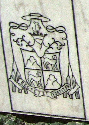 Rom, Campo Santo Teutonico, Wappen vom Epitaph des österreichischen Priesters und Diplomaten Johannes Montel (1831-1910)